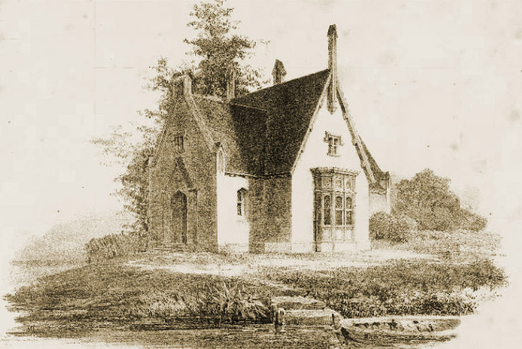 Unterförsterei ("Jägerhaus") Klein-Glienicke, (Veröffentlichung nach Persius, 1852)